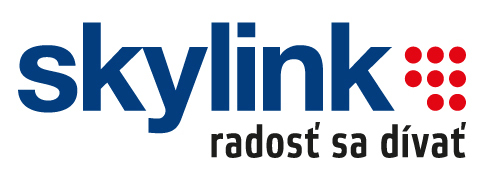 Logo Skylink SK